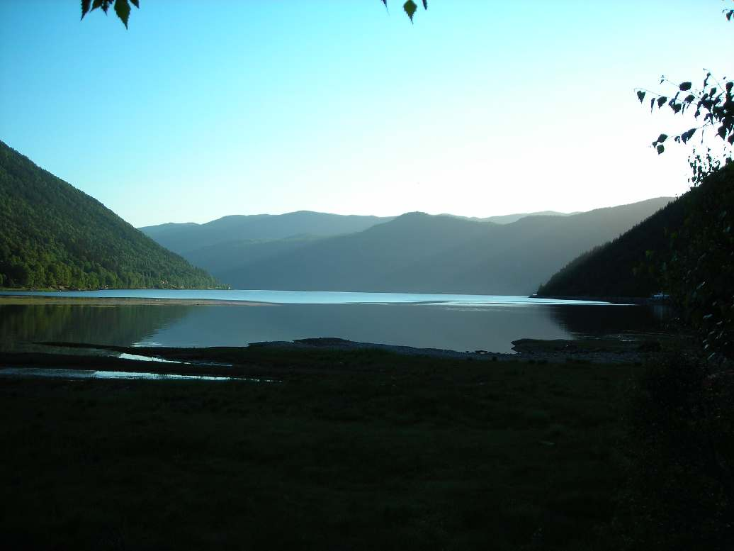 The lake Tinnsjø in Telemark, Norway seen from Mæl